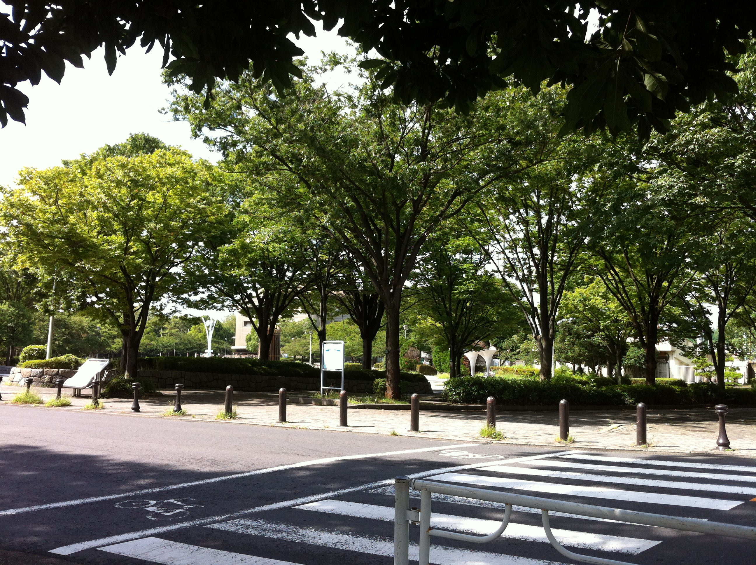 4 Chome Miyauchi, Nakahara-ku, Kawasaki-shi, Kanagawa-ken 211-0051, Japan